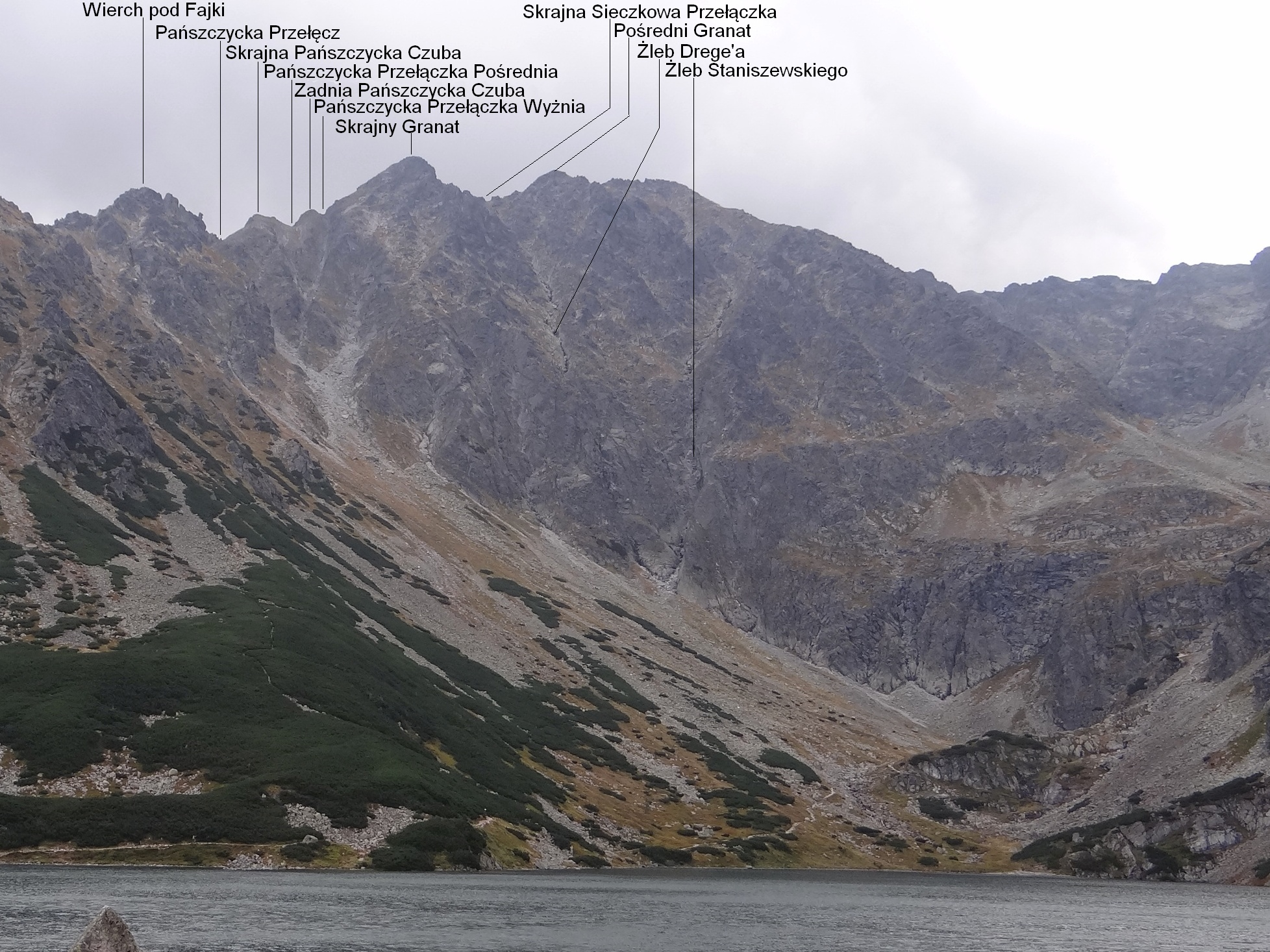 Widok znad Czarnego Stawu Gąsienicowego